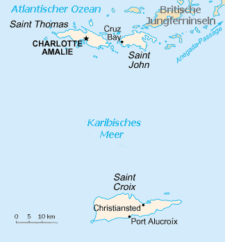 Karte Amerikanische Jungferninseln